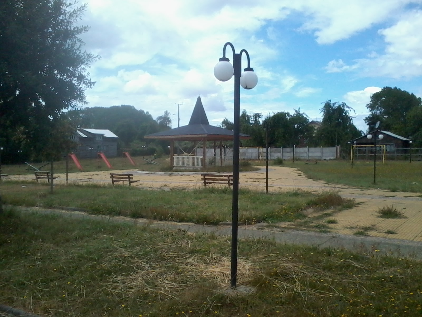 Plaza De Parga